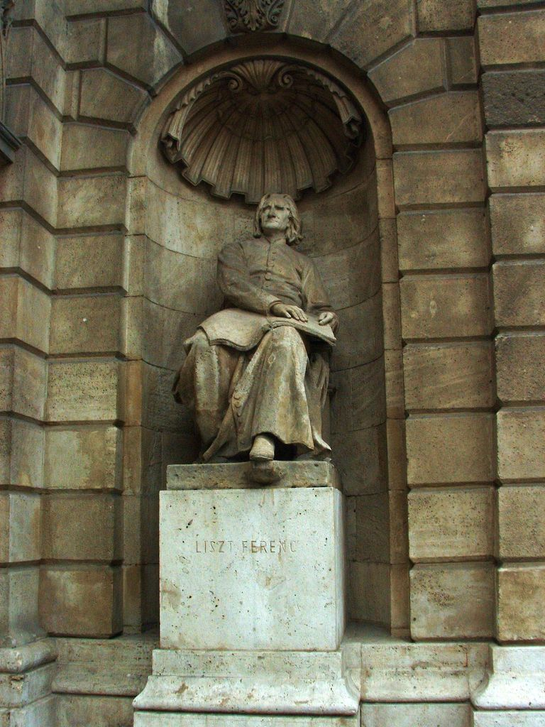 Liszt Ferenc szobra a Magyar Állami Operaház bejáratánál (Stróbl Alajos alkotása, 1885)